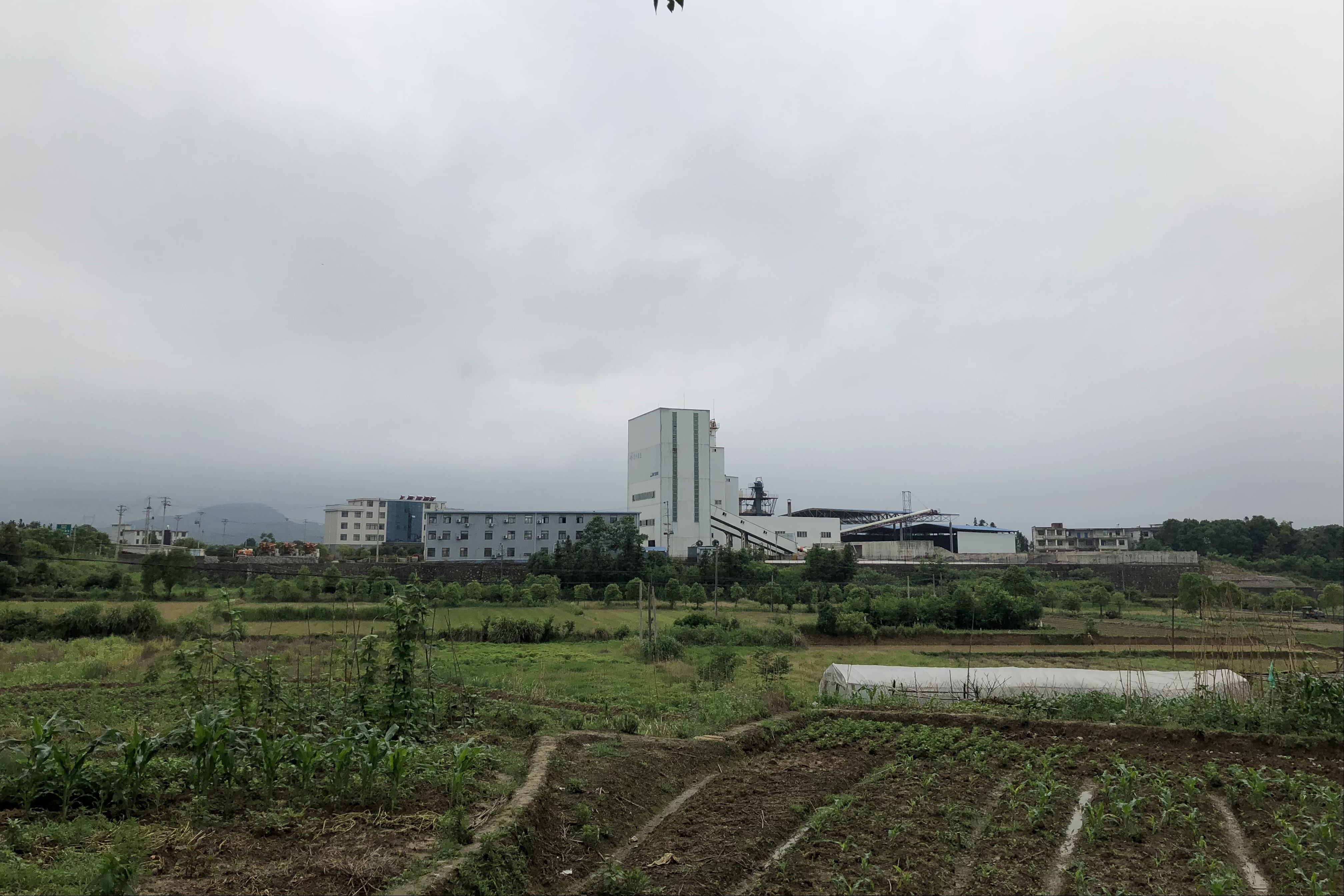 马桥镇农田和工厂